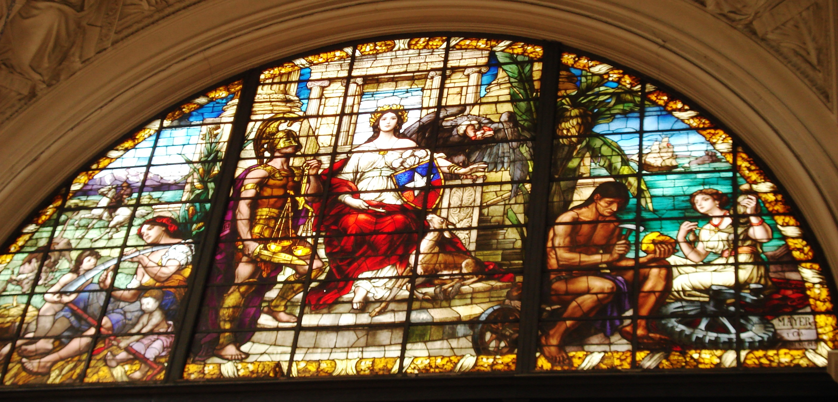 Vitral en el Palacio de los Tribunales de Justicia de Santiago de Chile.